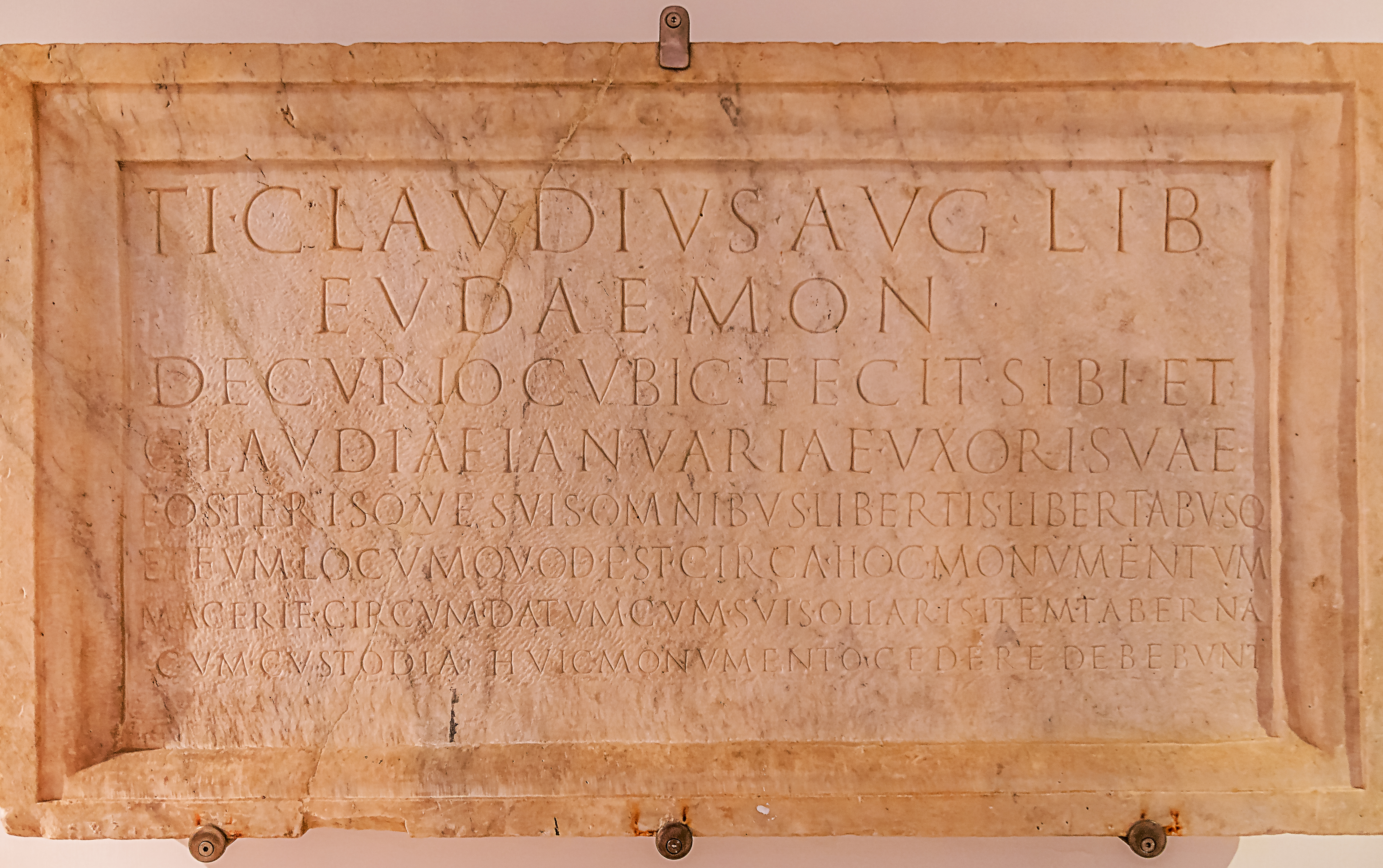 Eine Grabsteininschrift des von Kaiser Claudius freigelassenem Sklaven, Tiberius Claudius Eudaemon. Dieser war ein Bediensteter am kaiserlichen Hof gewesen, der als Vorgesetzter von 10 Kammerdienern für die persönliche Betreuung des Kaisers und seiner Familie verantwortlich war.